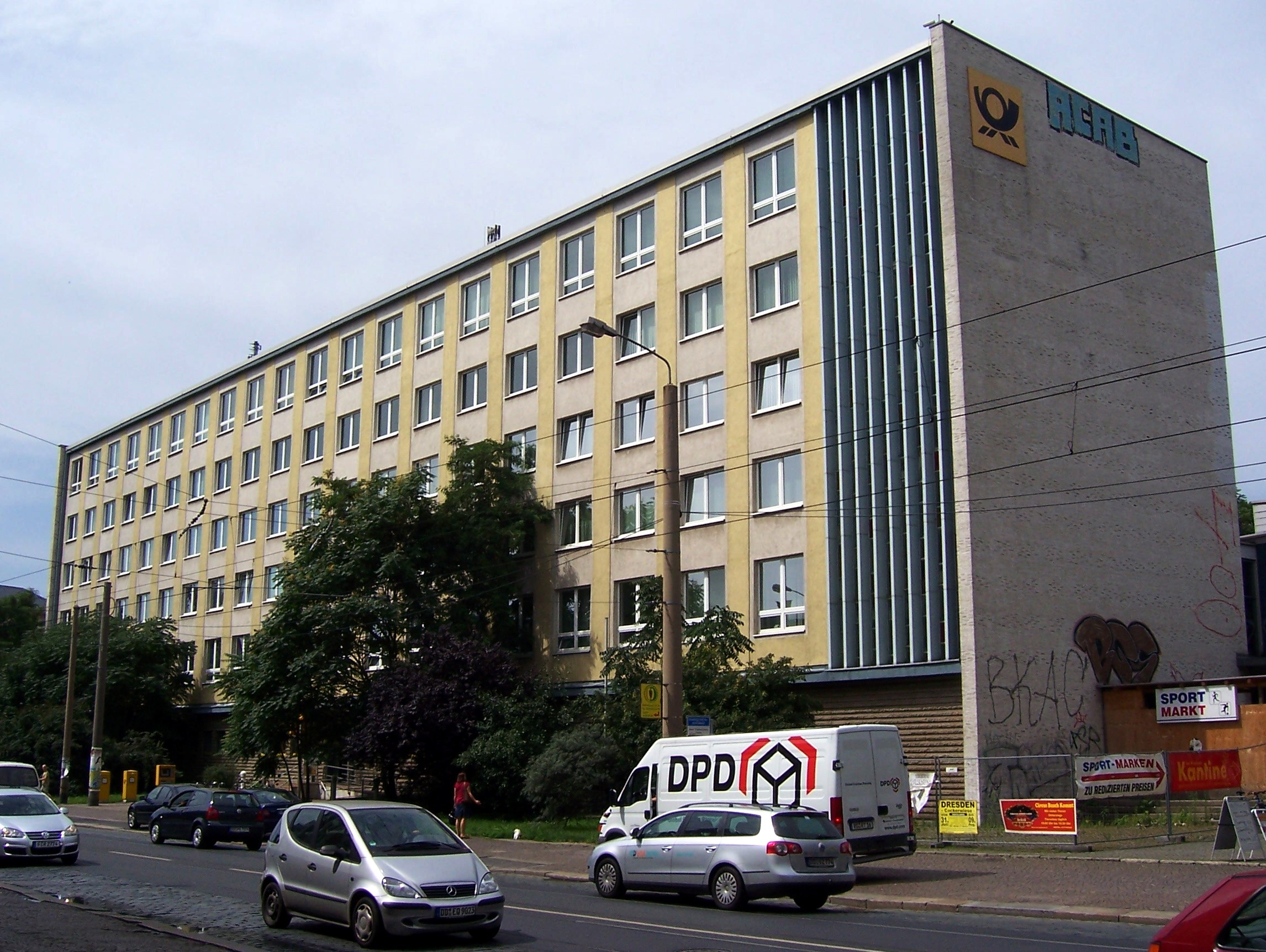 Postgebäude auf der Königsbrücker Straße in Dresden